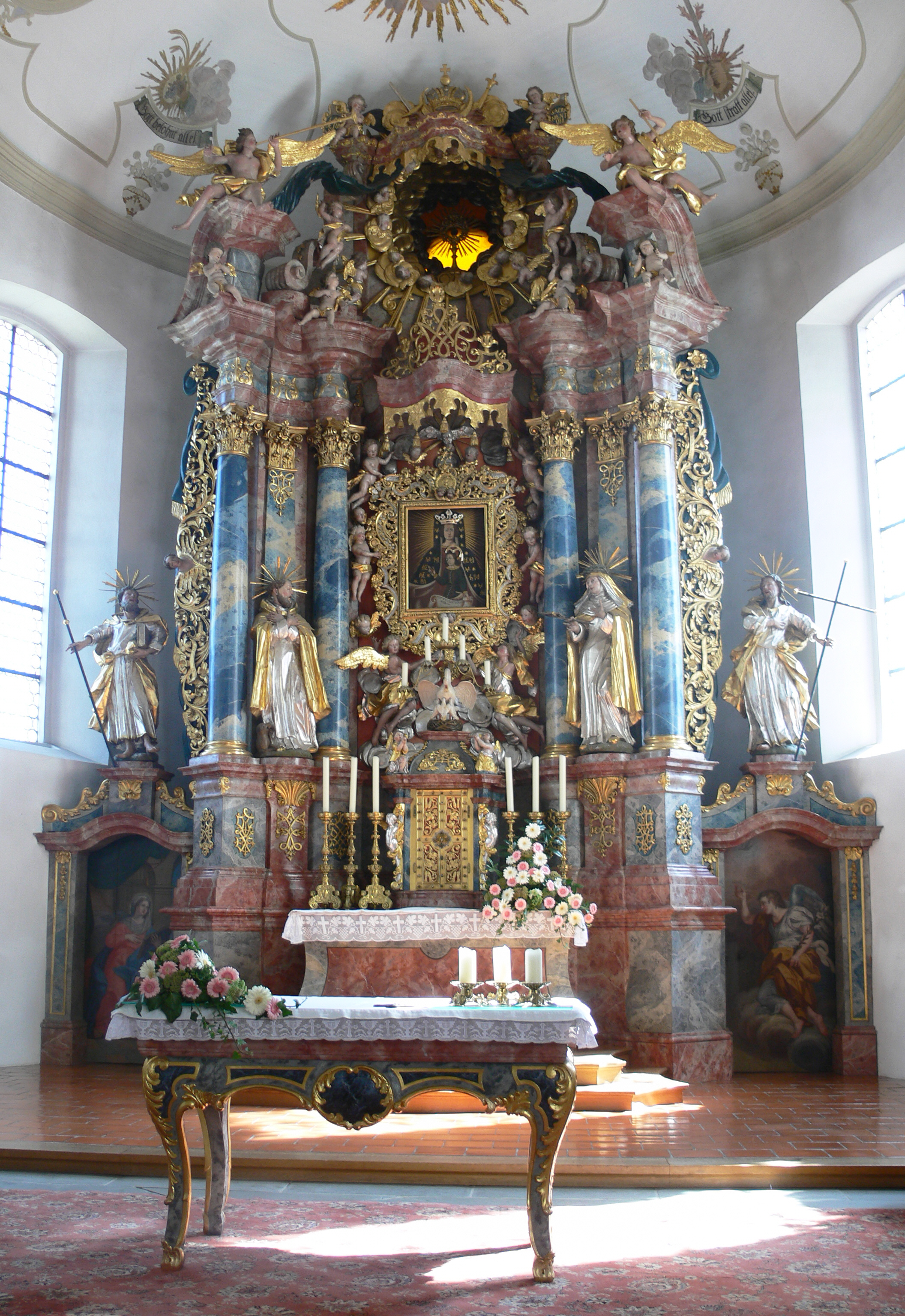 Pfarr- und Wallfahrtskirche St. Philippus und Jakobus, Bergatreute Hochaltar von Joseph Breimayer (Aufbauten), Johann Georg Reusch (4 Hauptfiguren) und Johann Georg Schall (Fassung und Türgemälde), 1730